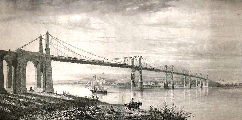 Le pont suspendu de Cubzac de 1836 sur la Dordogne à Cubzac-les-Ponts (Gironde, France)